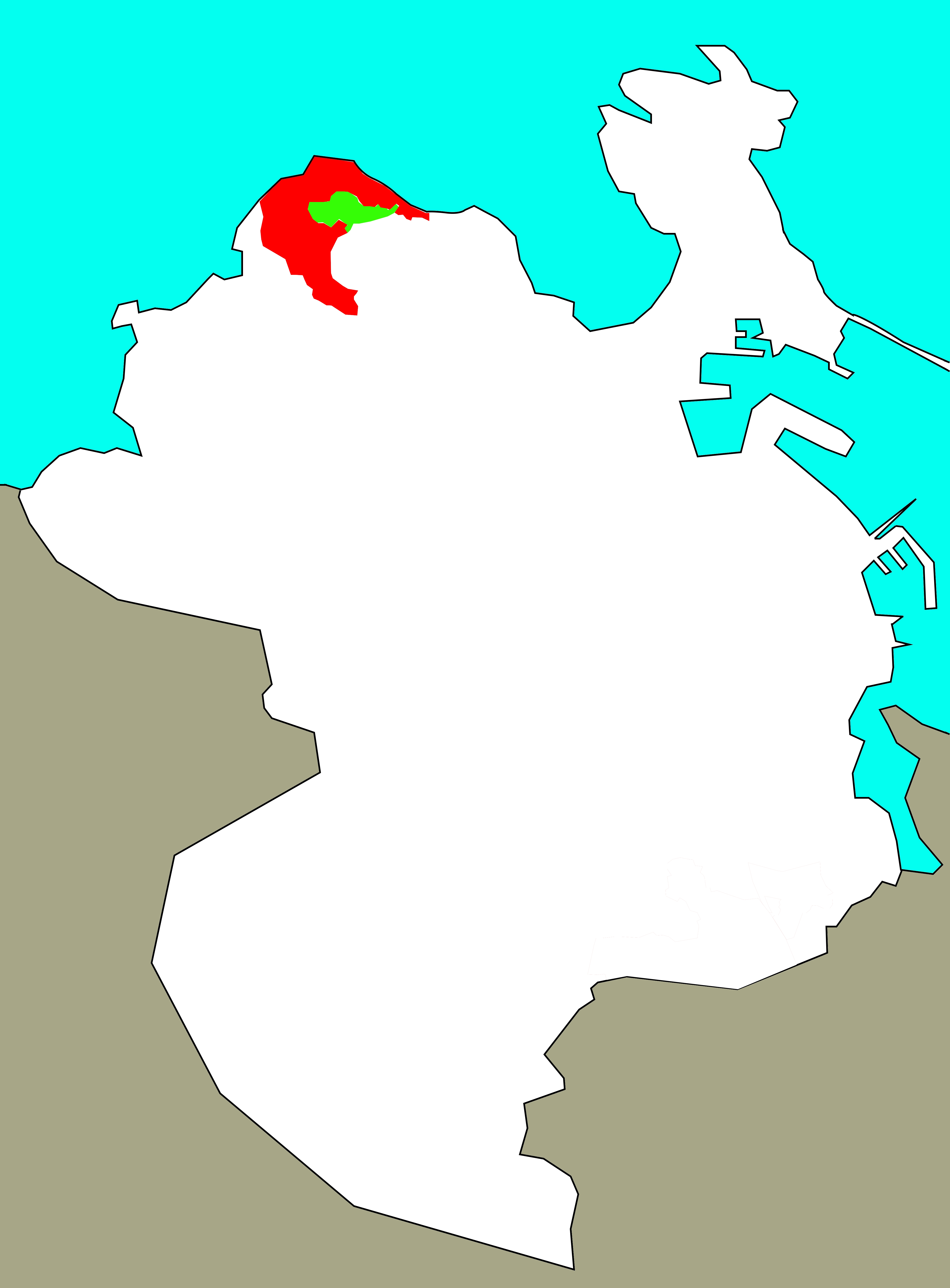 Situación do Monte de San Pedro no concello da Coruña. En verde, parque.[1]